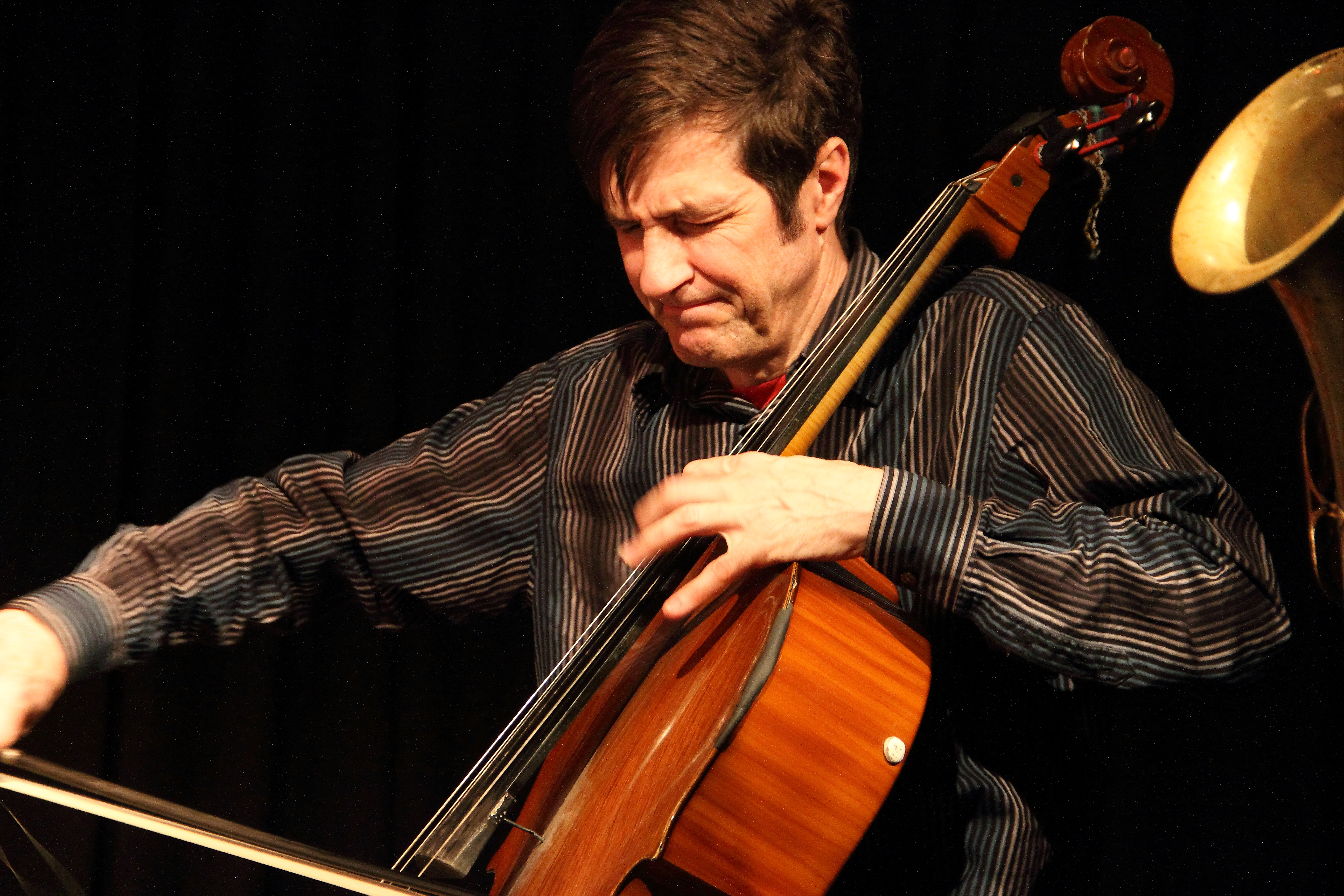 Konzert von Ullmann/Swell´s Chicago Plan im Club W71 in Weikersheim. Chicago Plan sind: Gebhard Ullmann (sax, bcl), Steve Swell (tromb), Fred Lonberg-Holm (cello, electr) und Michael Zerang (dr).